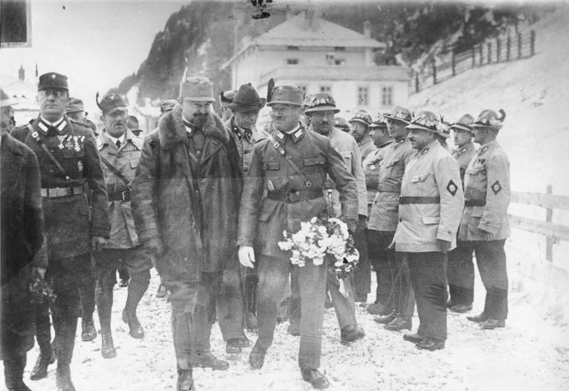 Rückkehr Major Pabst nach Oesterreich 267-30